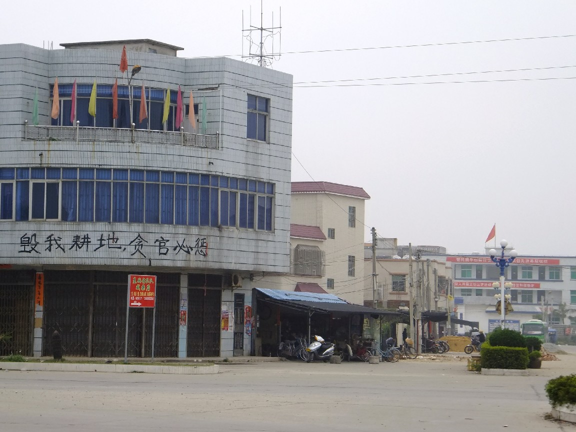 汕尾陸豐市烏坎村口之一幢建築，上面寫着「毀我耕地，貪官必懲」；右為遠處之烏坎村內之派出所